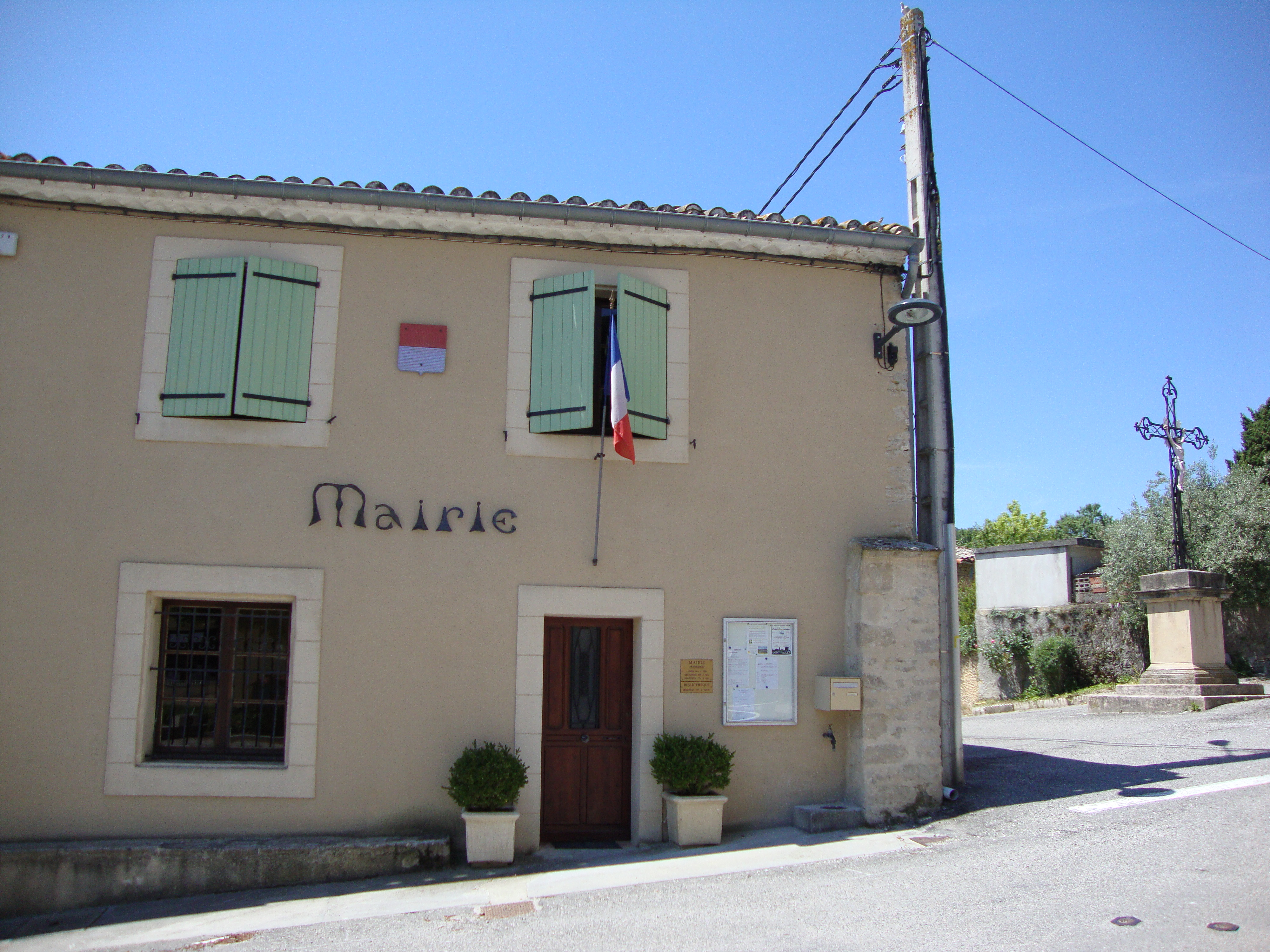 Saint-Paulet (Aude, Fr) mairie